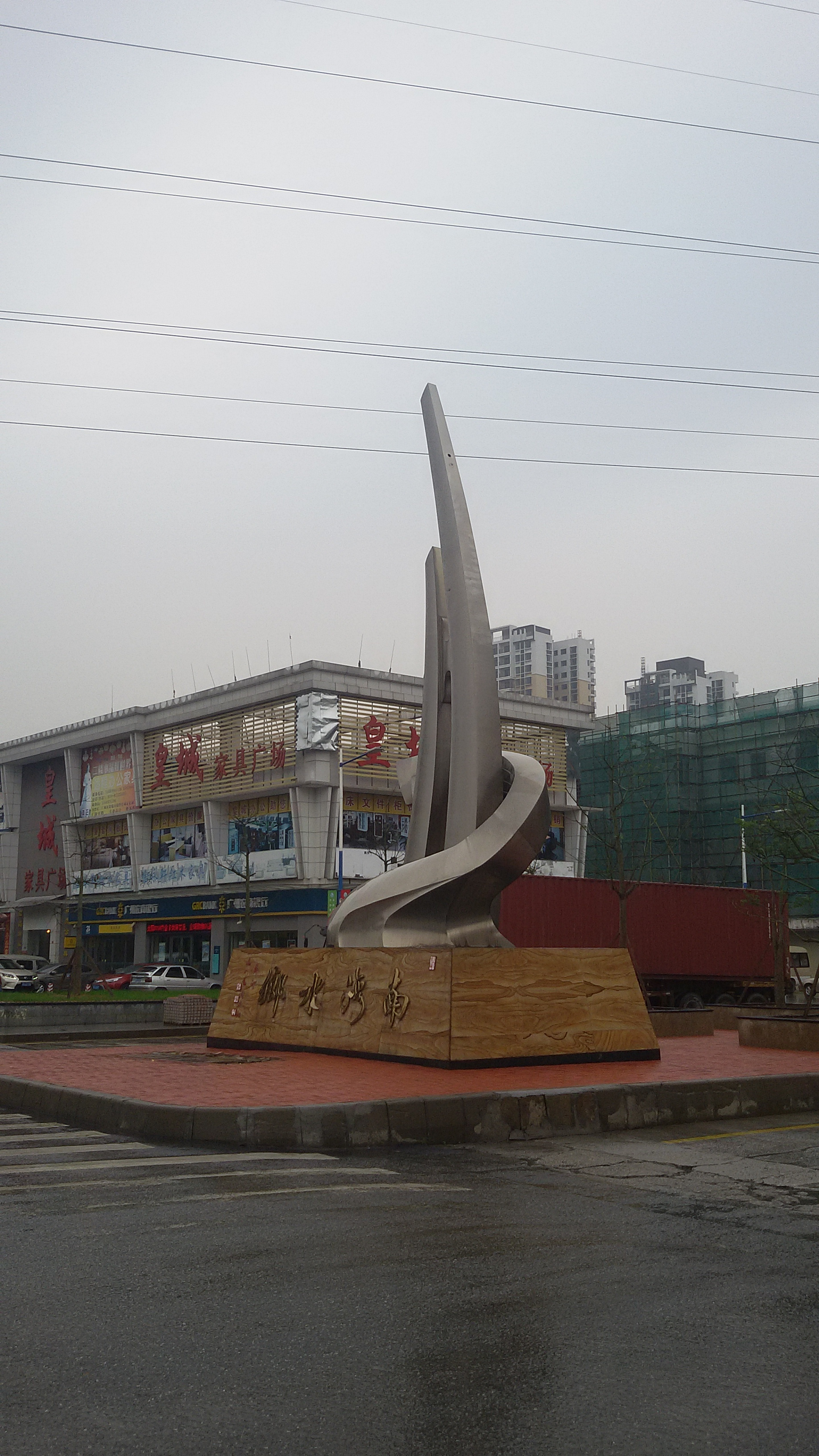 粵語: 南灣水鄉門口嘅紀念碑